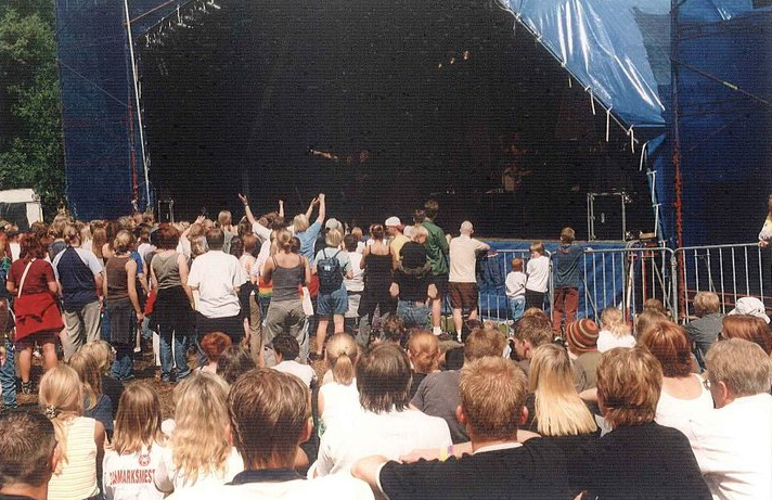 Storscenen på Hestepladsen i Skalskoven 1999